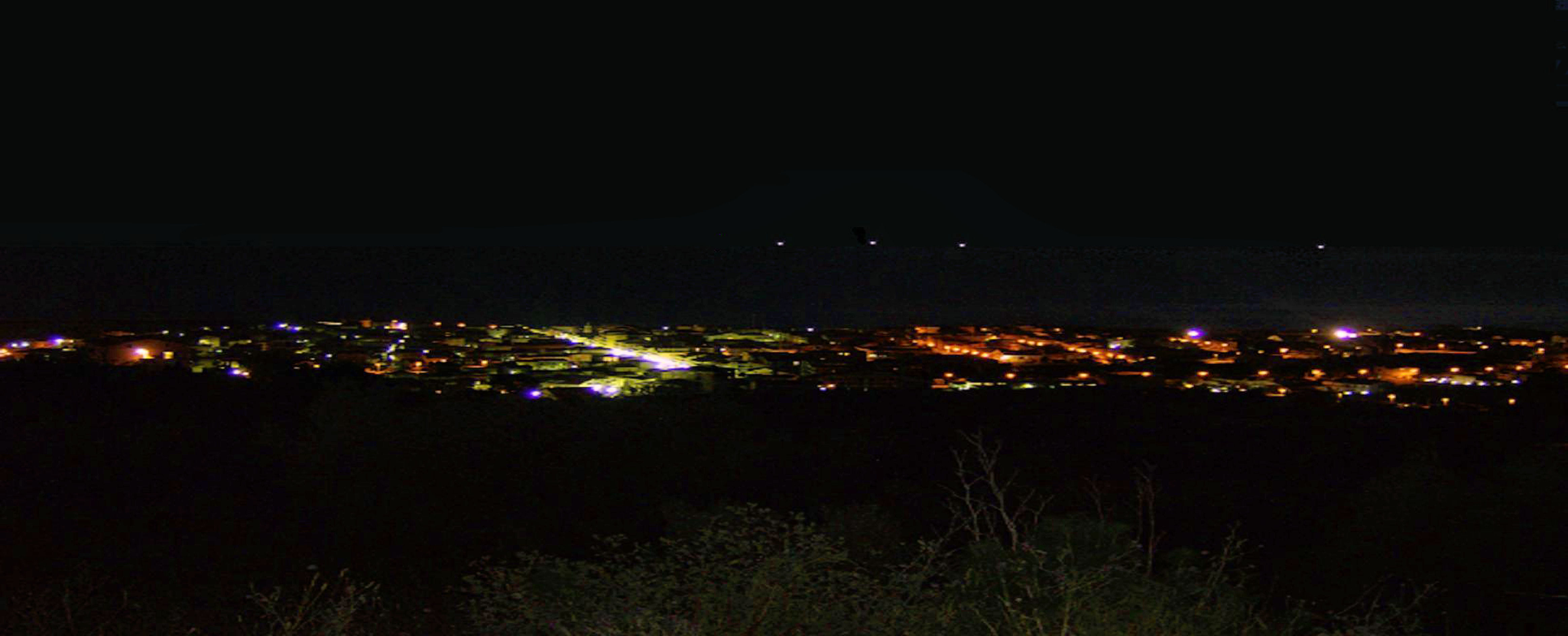 Io sottoscritto Luigi Salvatore Vadacchino, utente di Wikipedia sotto il nome di Lodewijk Vadacchino, cedo l'immagine HPIM0659.jpg a Wikimedia Italia, sotto licenza CC-BY-SA, con il nome Campora San Giovanni 09 - Panarama Veraniego Nocturno.jpg. L'Immagine fotografica raffigura la mia cittadina natale di Campora San Giovanni, ovvero una sua panoramica al tramonto con uno scorcio di flora locale. Porgo come sempre i miei distintissimi saluti, con l'augurio che possiate venirmi a far visita. Vostro come sempre23:06, 16 giu 2009 (CEST)